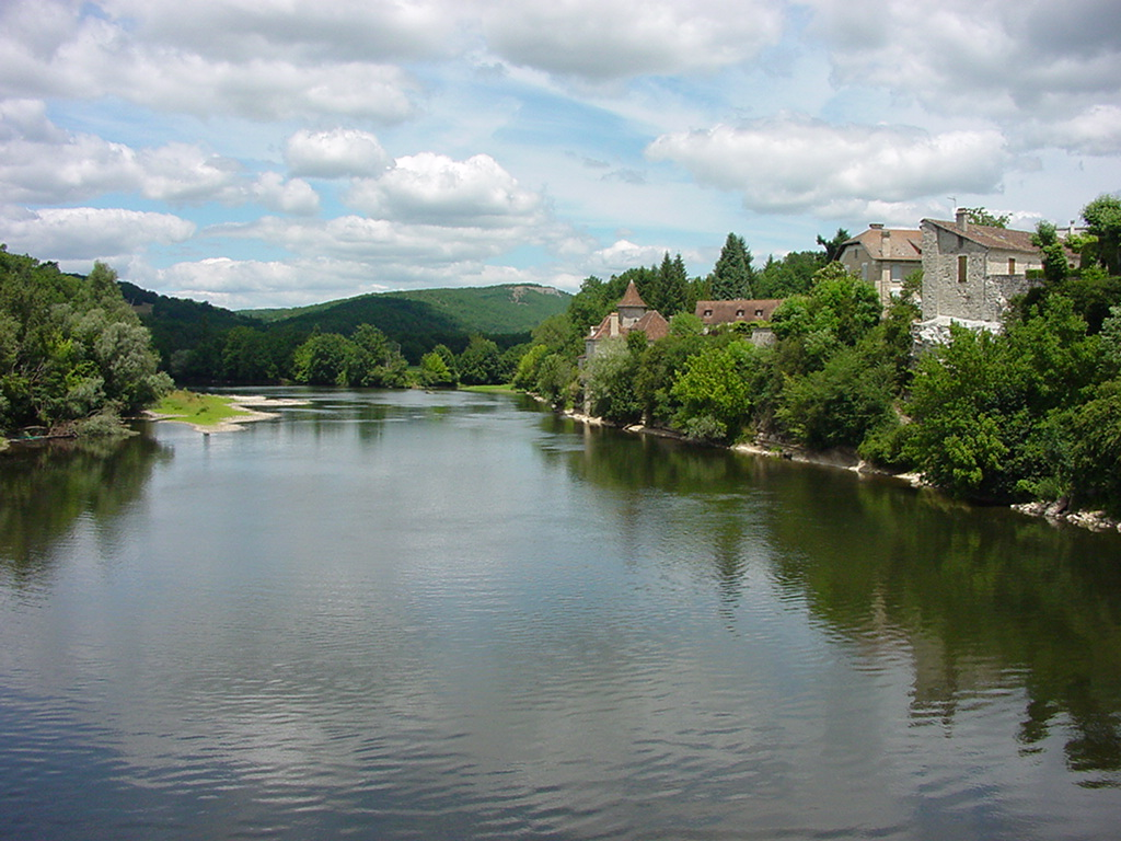 Dordogne